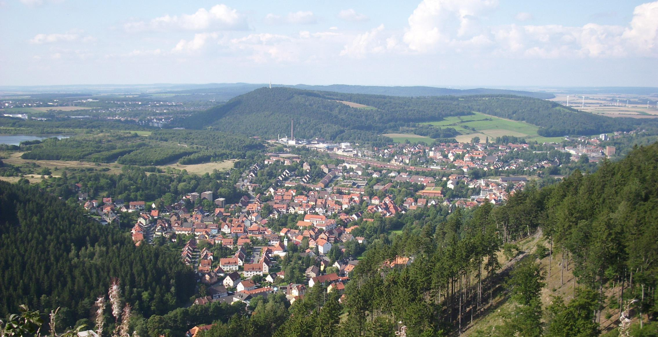 Blick über Oker